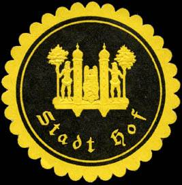 Sealing stamp Title: Stadt Hof Description: schwarz, gelb, geprägt Place: Hof size: 4 cm